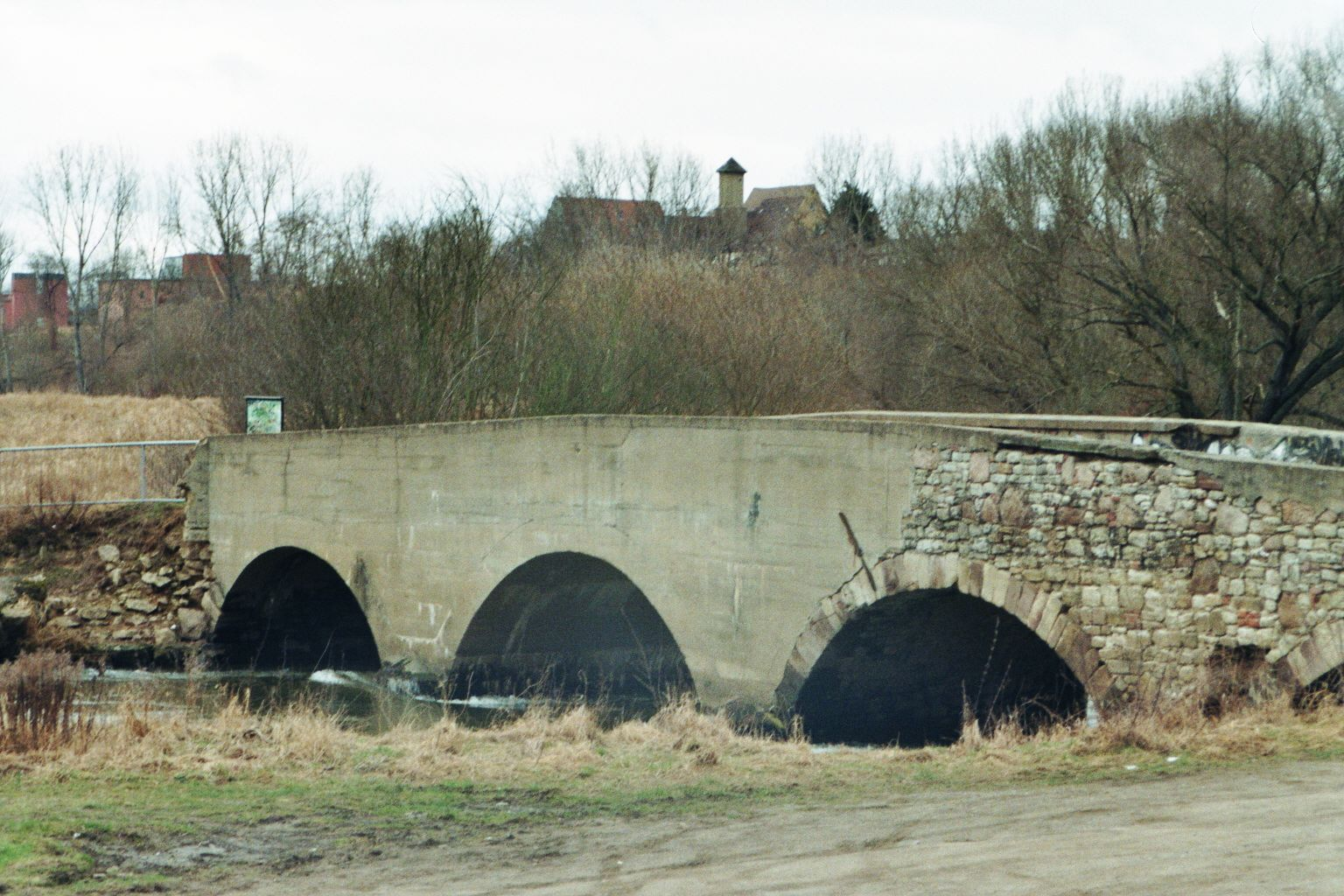 Die Schafbrücke bei Halle-Ammendorf über die Weiße Elster vor der Mündung in die Saale